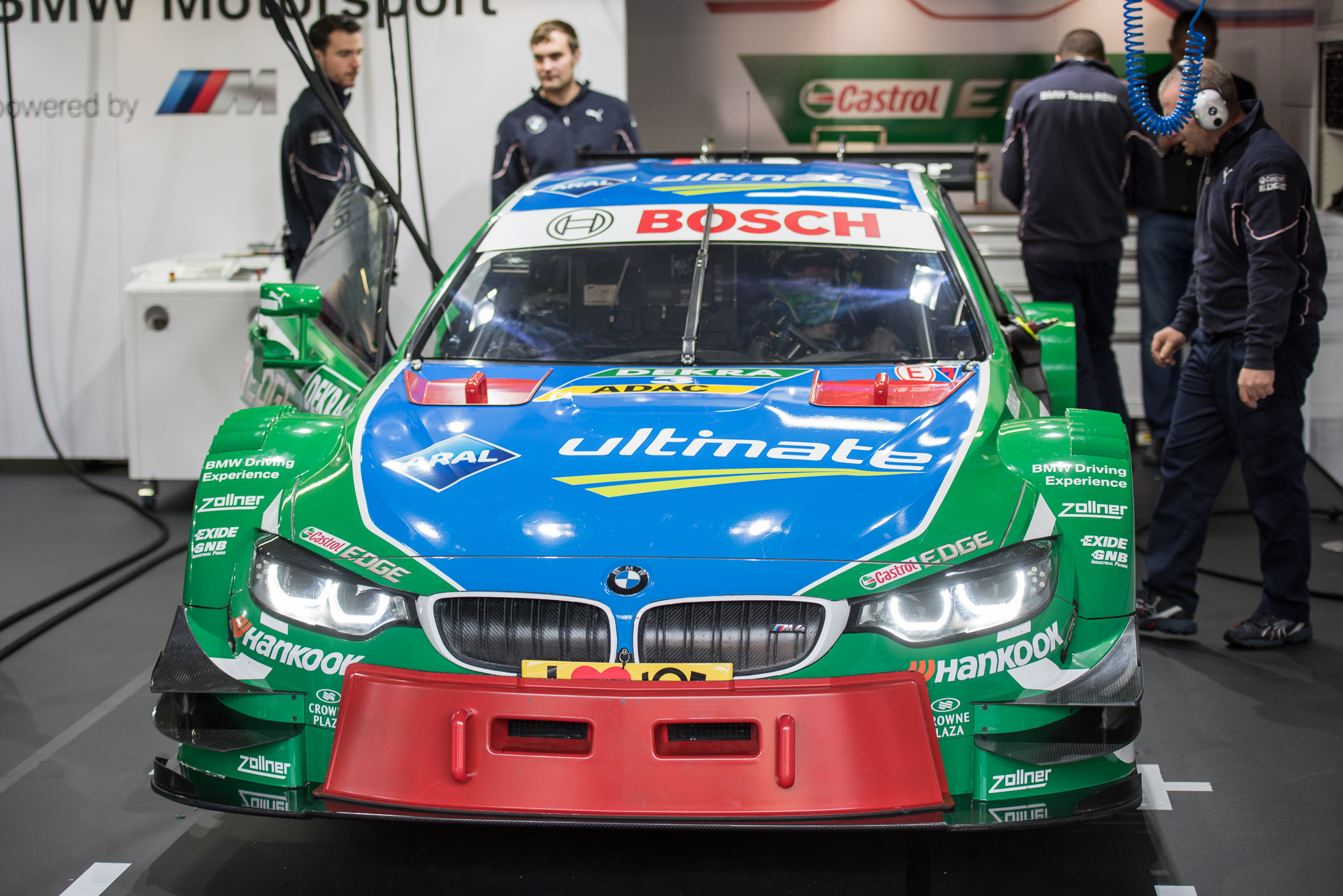 Augusto Farfus,Box,Boxengasse,Castrol EDGE BMW M4 DTM,DTM,Deutsche Tourenwagen Masters,Hockenheimring,Motorsport,RBM,Racing Bart Mampaey